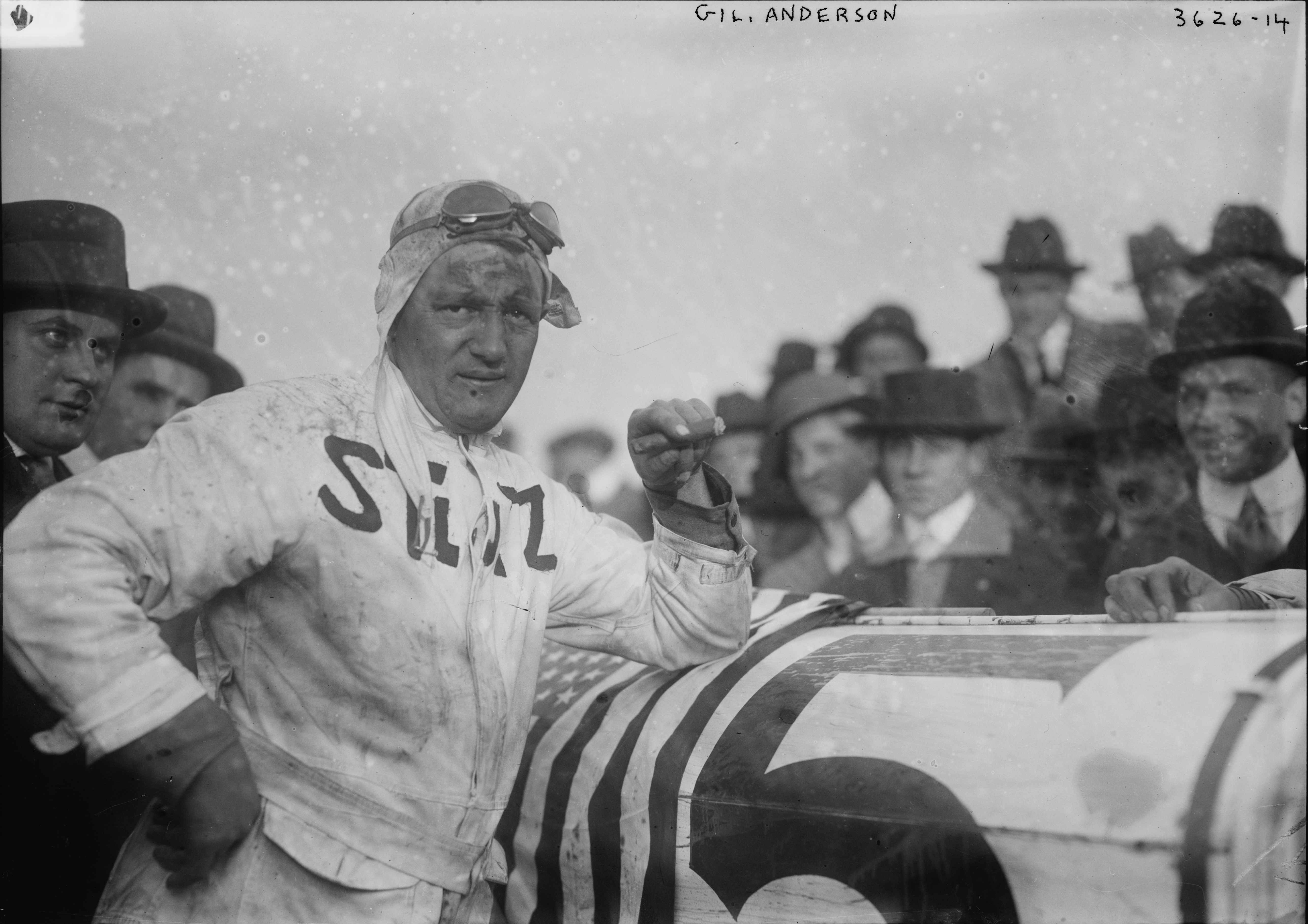 Gil Andersen (Norwegian-American racecar driver) in 1910s